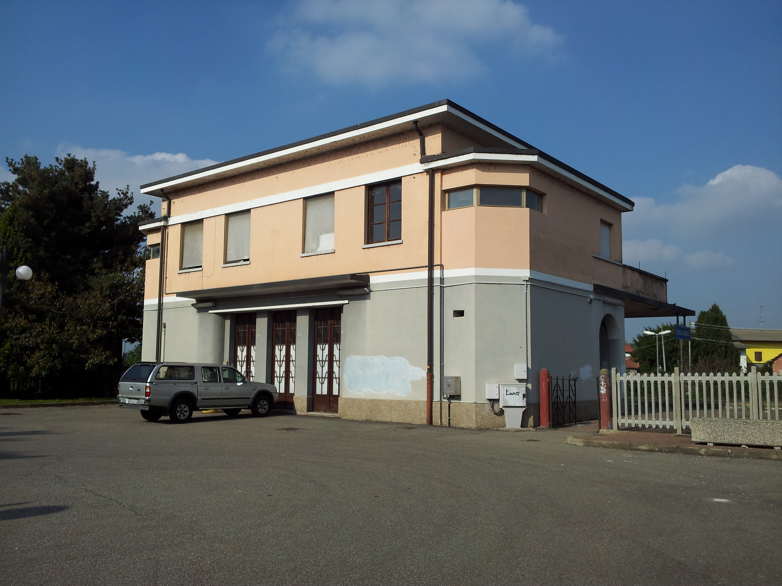 Stazione lato strada.